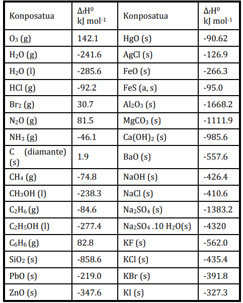 Formazio entalpien taula bat